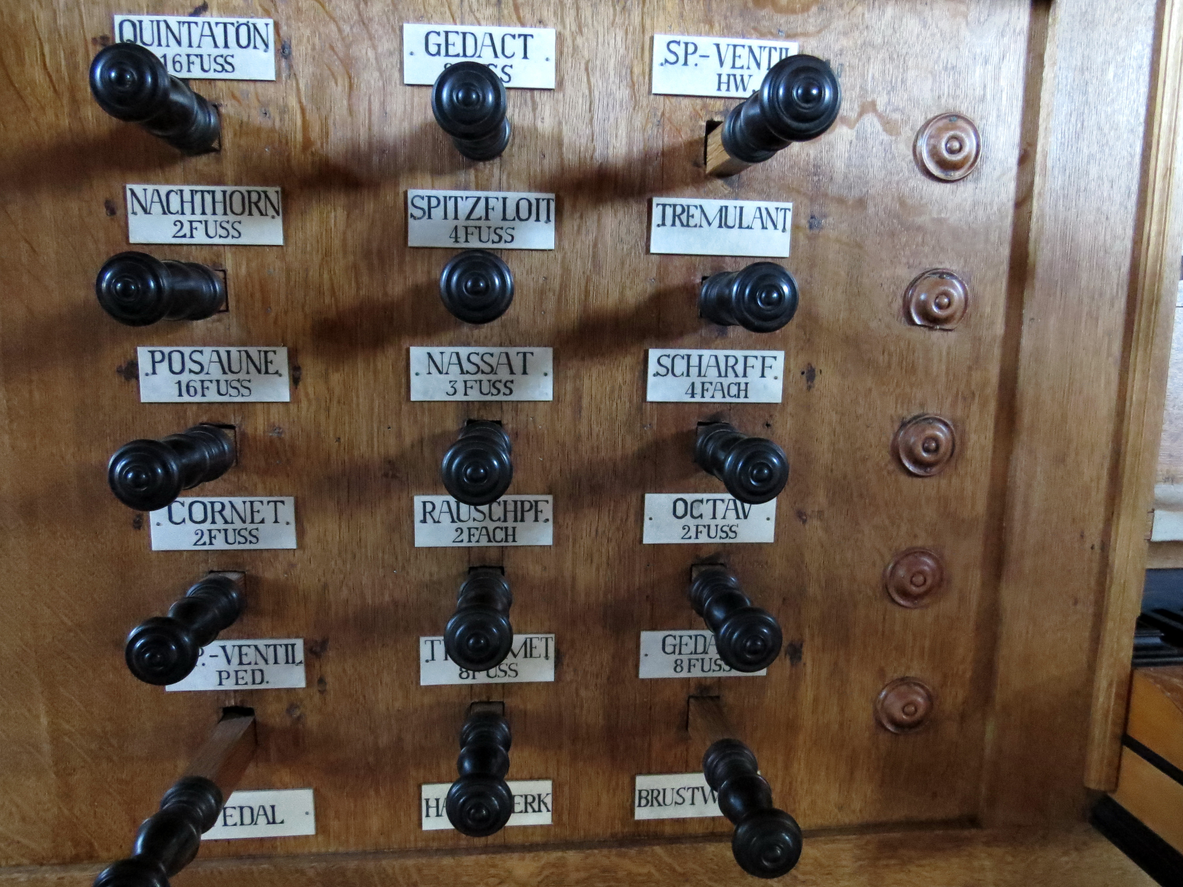 Registerzüge links der Orgel in der Alten Kirche Pellworm, Schleswig-Holstein